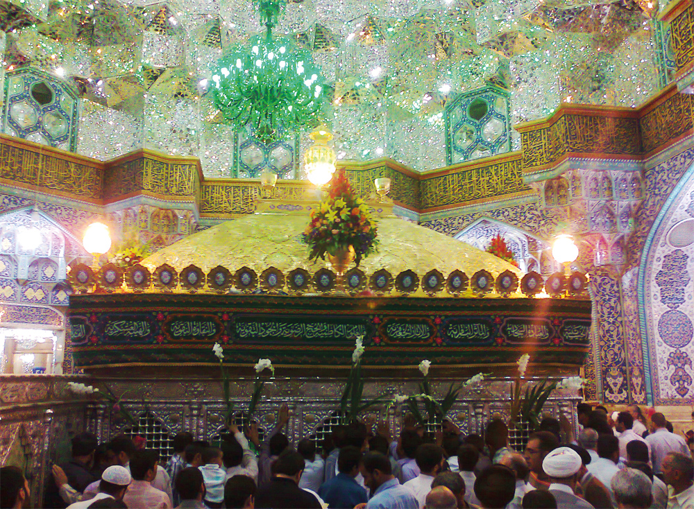 ضریح فاطمه معصومه در قم روز میلاد فاطمه معصومه